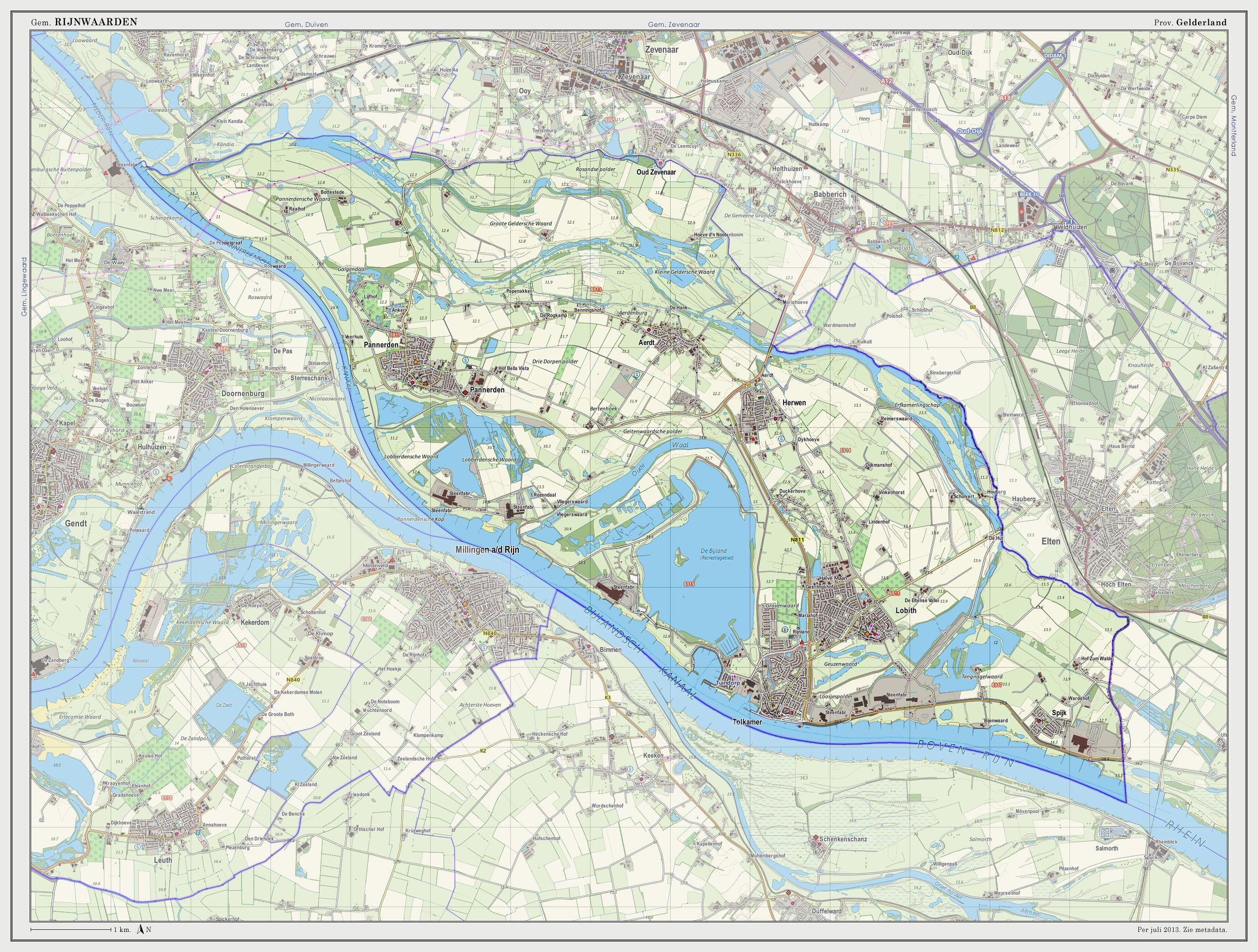 Topografische kaart van gemeente Rijnwaarden (2013). Samengesteld door Jan-Willem van Aalst op basis van de GML open geodata van de BRT/Top10NL (basisregistratie Topografie, Kadaster 2011), vrijgegeven door Kadaster onder de Creative Commons BY licentie. Additionele gegevens uit BAG (8 juli 2013), uit de Open Street Map (9 juli 2013) en uit de Risicokaart. Peildatum kaartbeeld: 9 juli 2013. Zie ook Gemeentenatlas.nl Samenstelling en kleurenschema: Jan-Willem van Aalst, met QuantumGIS en Photoshop. Zie ook de Legenda.